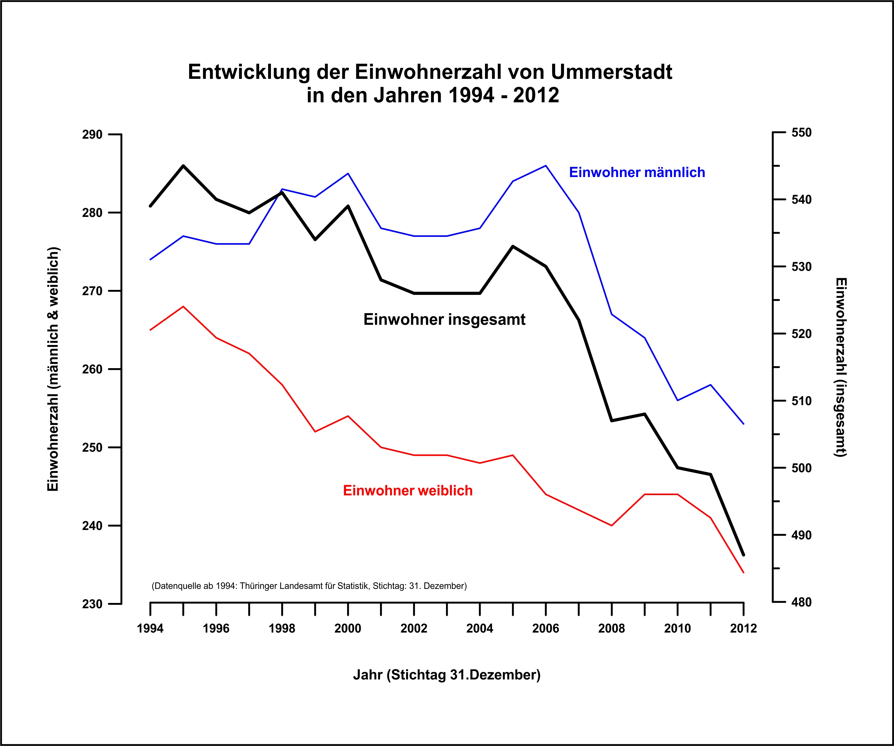 Entwicklung der Einwohnerzahlen der Stadt Ummerstadt (Landkreis Hildburghausen) 1994 - 2012; Vor allem seit 2005 ist ein kontinuierlicher Rückgang der Bevölkerungszahlen zu verzeichnen. Dabei fällt auf, dass der Trend der allgmeinen Bevölkerungsentwicklung stark an den Verlauf der Bevölkerungsentwicklung männlich gebunden ist, während die Bevölkerungszahl weiblich fast konstant abnimmt. Dies ist wahrscheinlich auf die generelle Heimattreue der Männer zurückzuführen, die nach Bundeswehr, Zivildienst und Ausbildung wieder zurück nach Hause ziehen, wo sie zwar wirtschaftlich geringe Aussichten, aber die soziale Integration in das dörfliche Vereinsleben (Fußball, Brauverein) vorfinden.